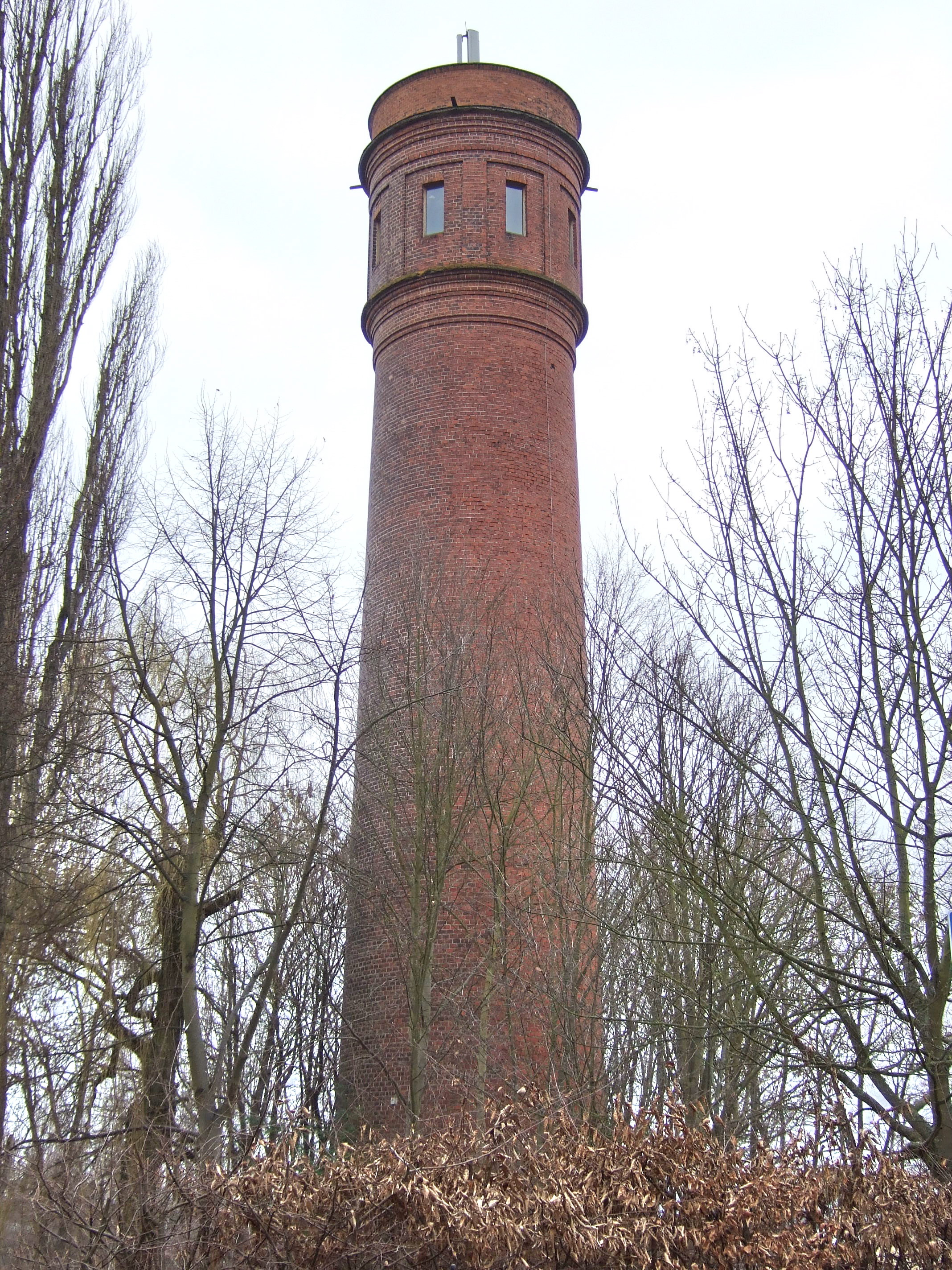 Wasserturm der ehemaligen Mechanischen Baumwoll-Spinnerei in Bayreuth, Denkmal Nr. D-4-62-000-419